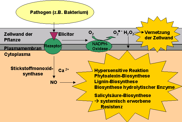 Pflanzen reagieren auf Pathogen-Befall mit verschiedenen Abwehrmaßnahmen, an deren Auslösung Wasserstoffperoxid und Stickstoffmonoxid beteiligt sind